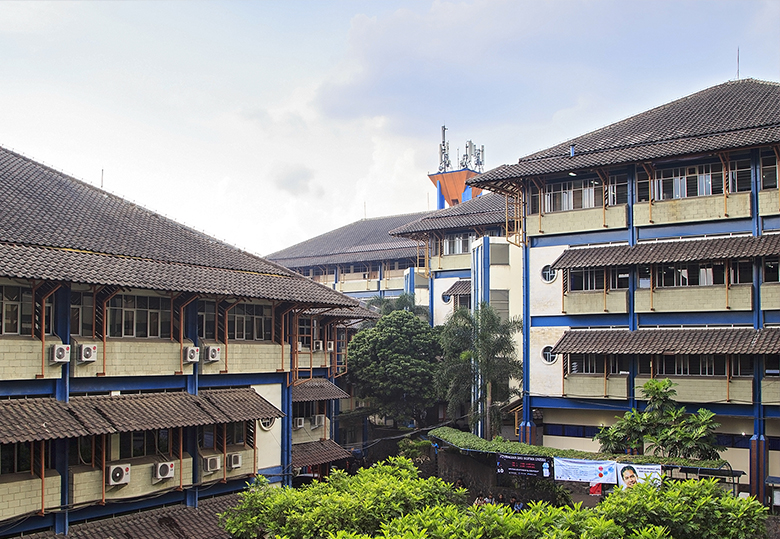 View UNISBA dari Masjid Al-Asyari